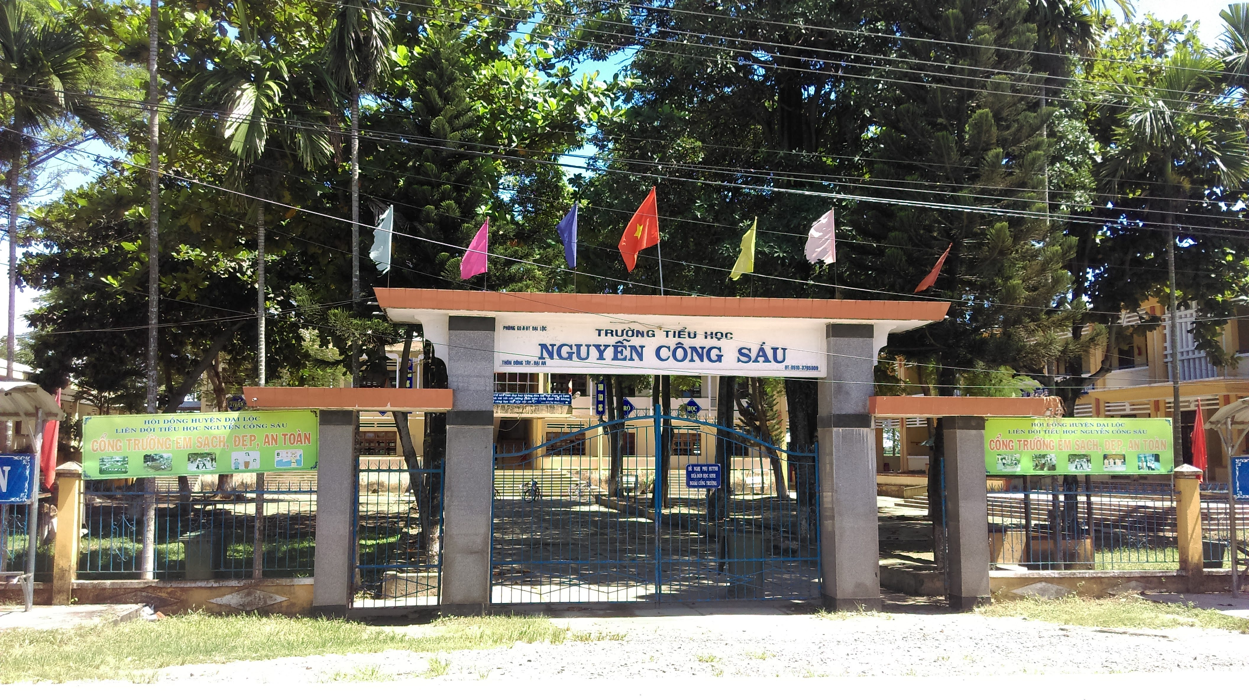 Trường Tiểu học Nguyễn Công Sáu, Đại An, Đại Lộc, Quảng Nam